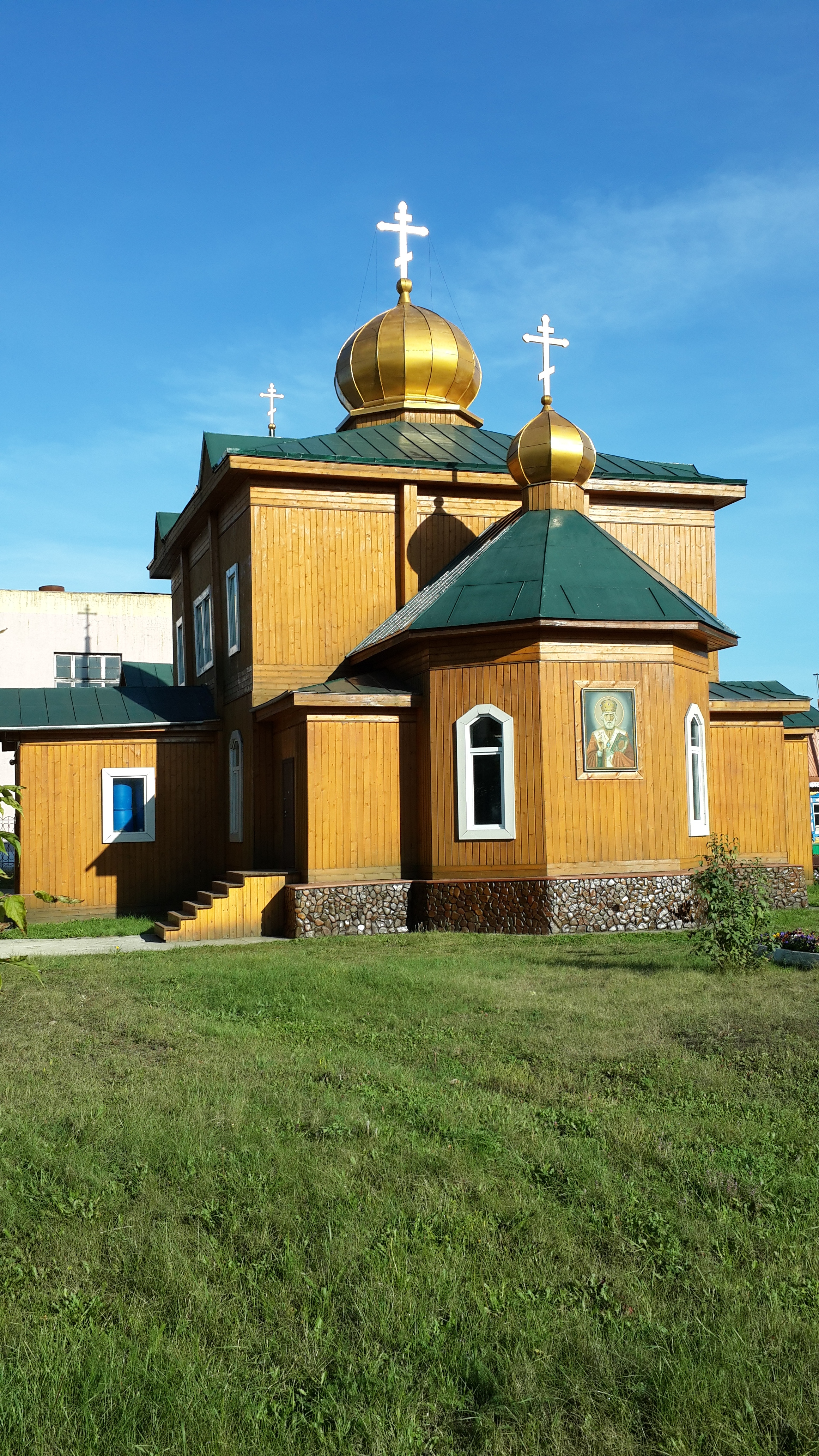 Никольская церковь (Иркутская область, Нижнеудинск, Масловского улица, 10б)